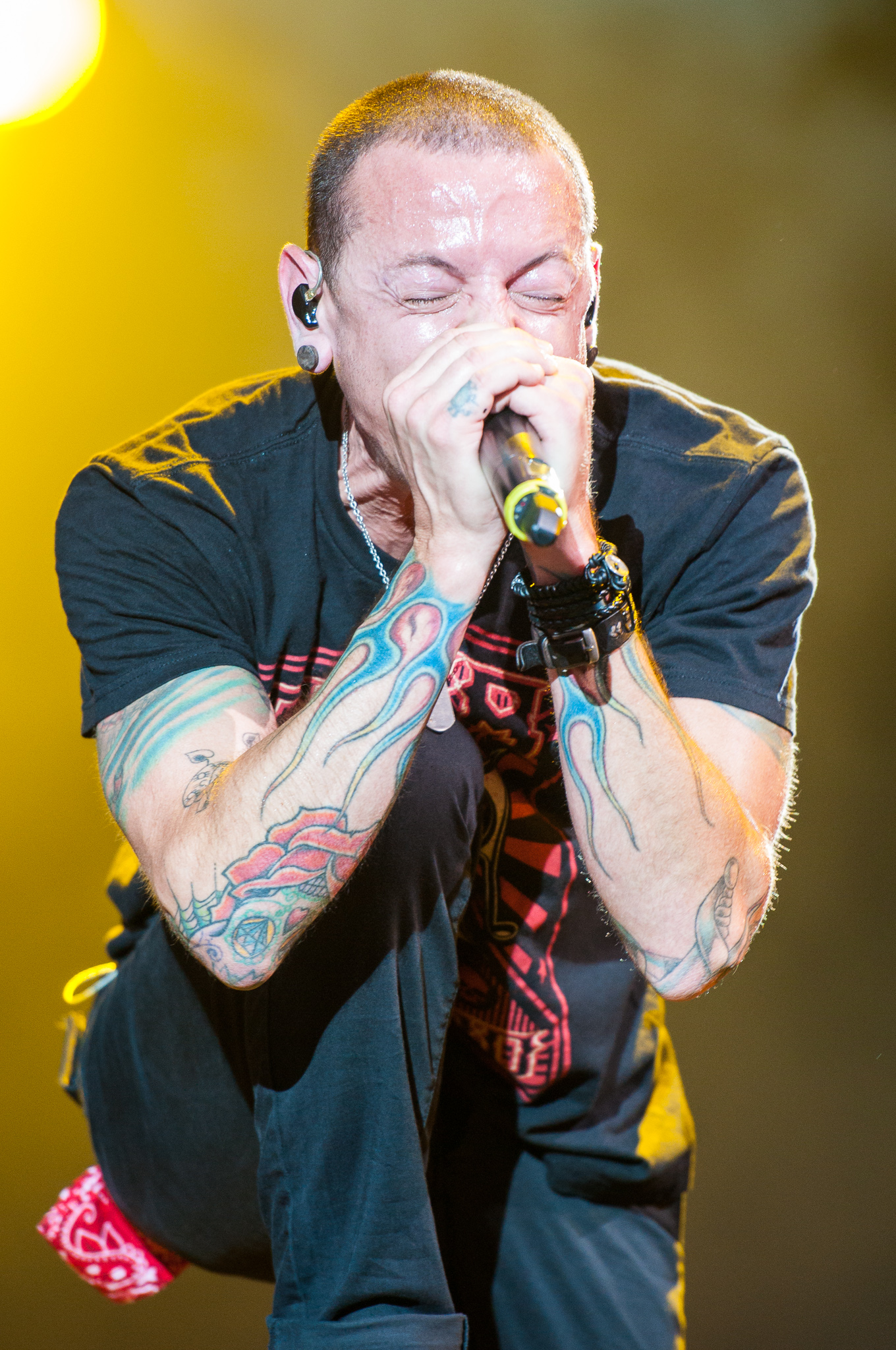 ARGO-Konzerte,Centerstage,Chester Bennington,Konzert,Linkin Park,Livekonzert,Livemusik,Musik,RiP,Rock im Park 2014